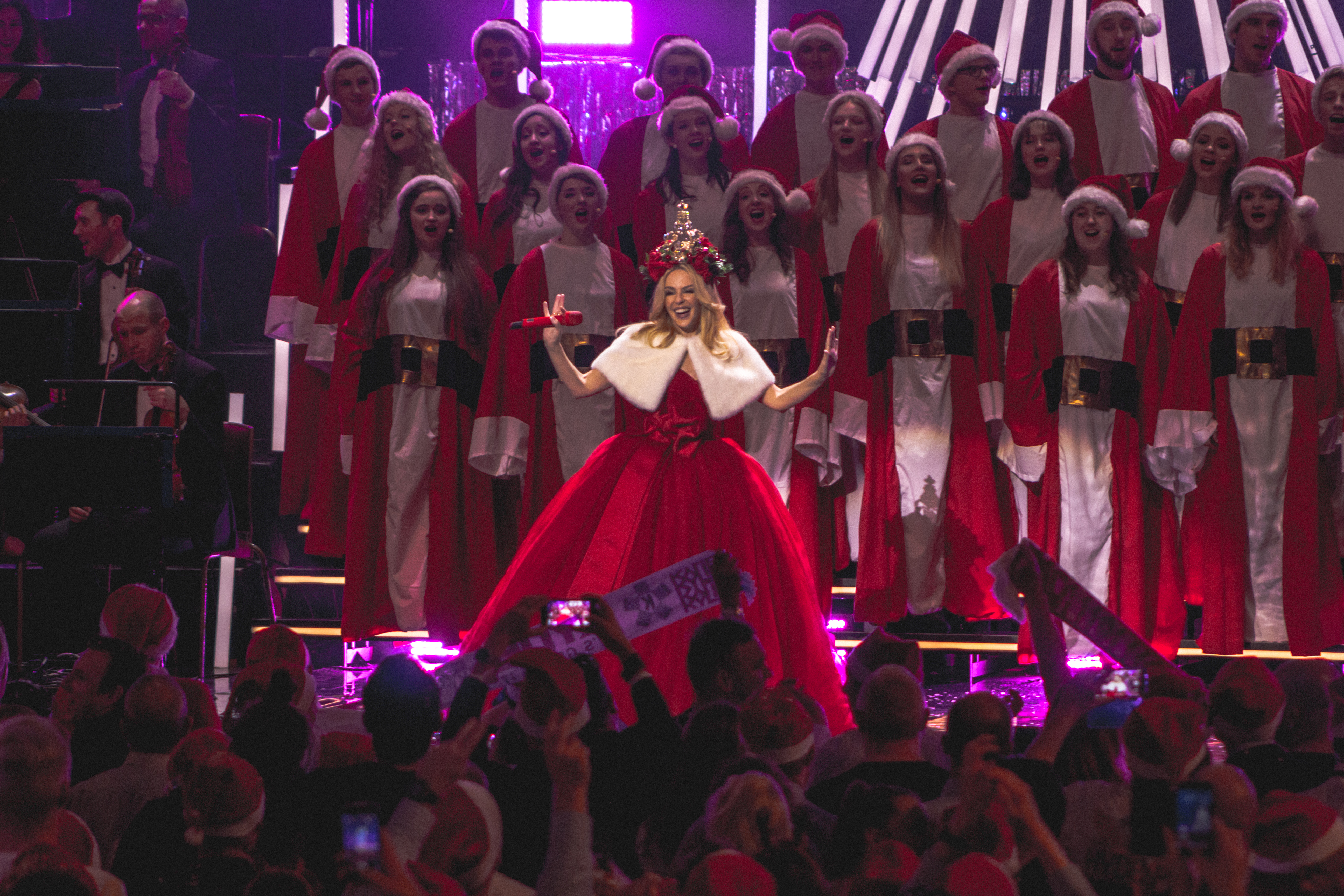 KylieRAH111215-41